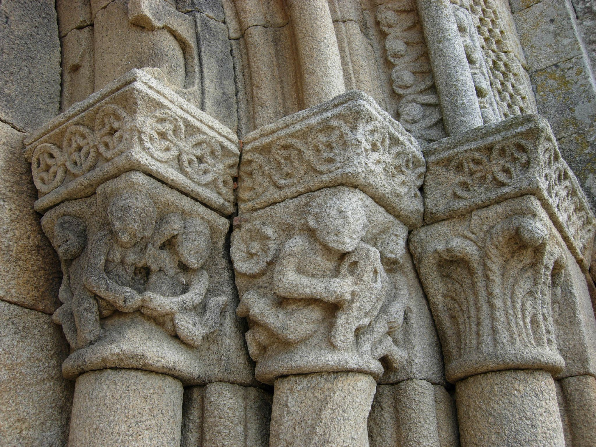 Capiteles en el lado derecho de la portada occidental.